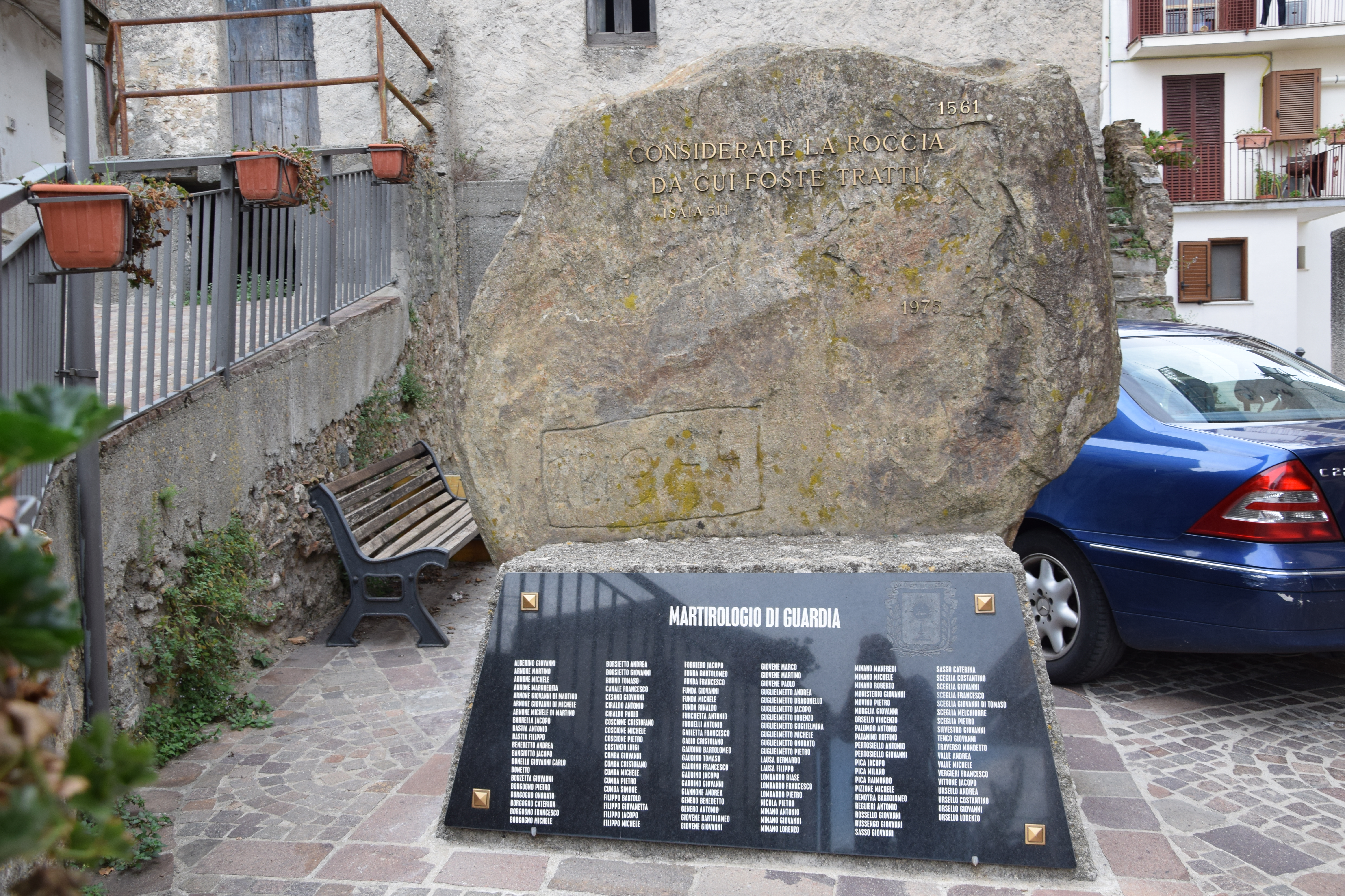 Roccia di Val Pellice This is a photo of a monument which is part of cultural heritage of Italy.